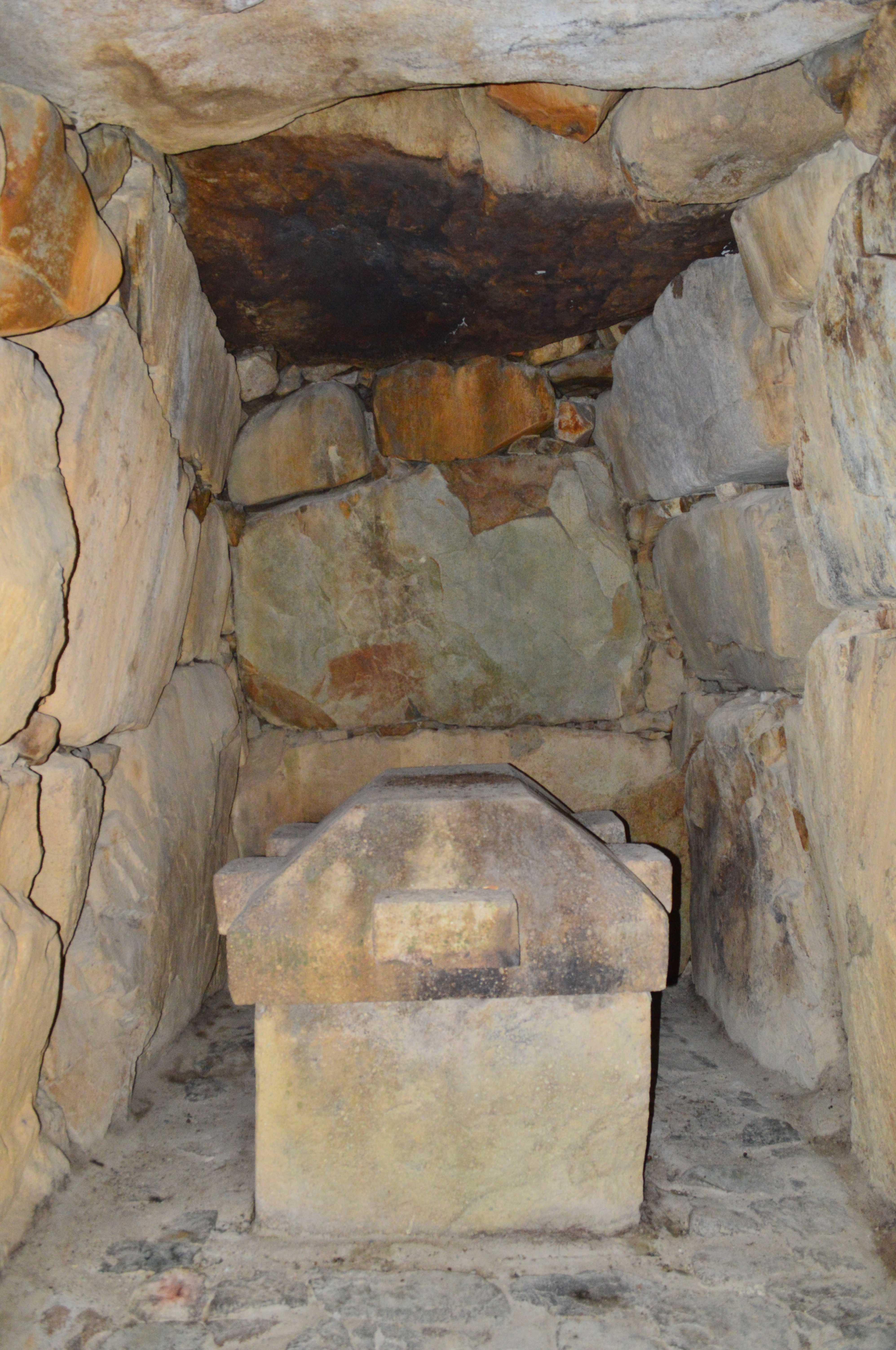 白鳥塚古墳 (宝塚市) 石室玄室